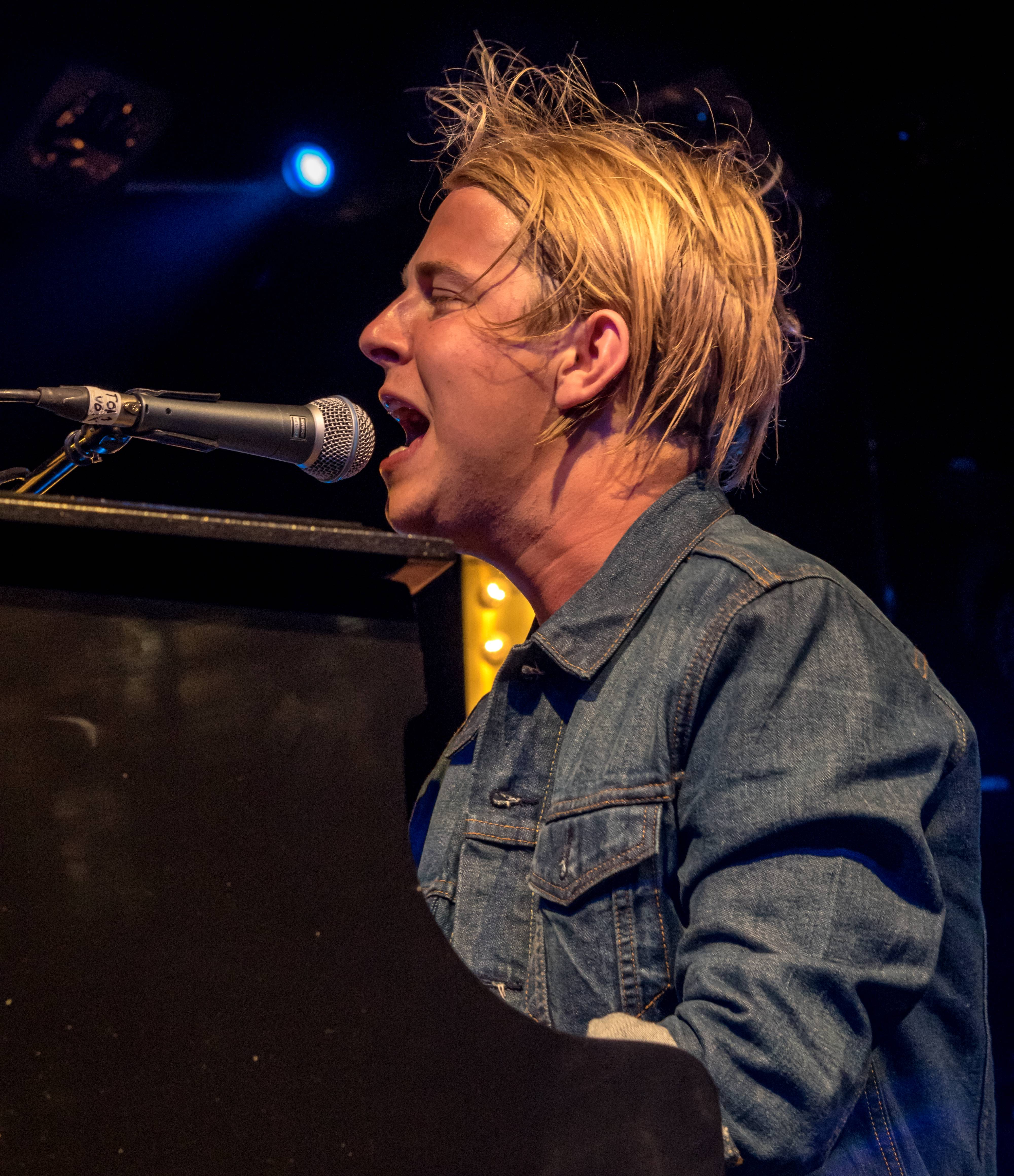 Bilder vom ZMF 2015 Tom Odell 16. Juli 2015